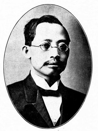 中文（台灣）: 國會議員肖像